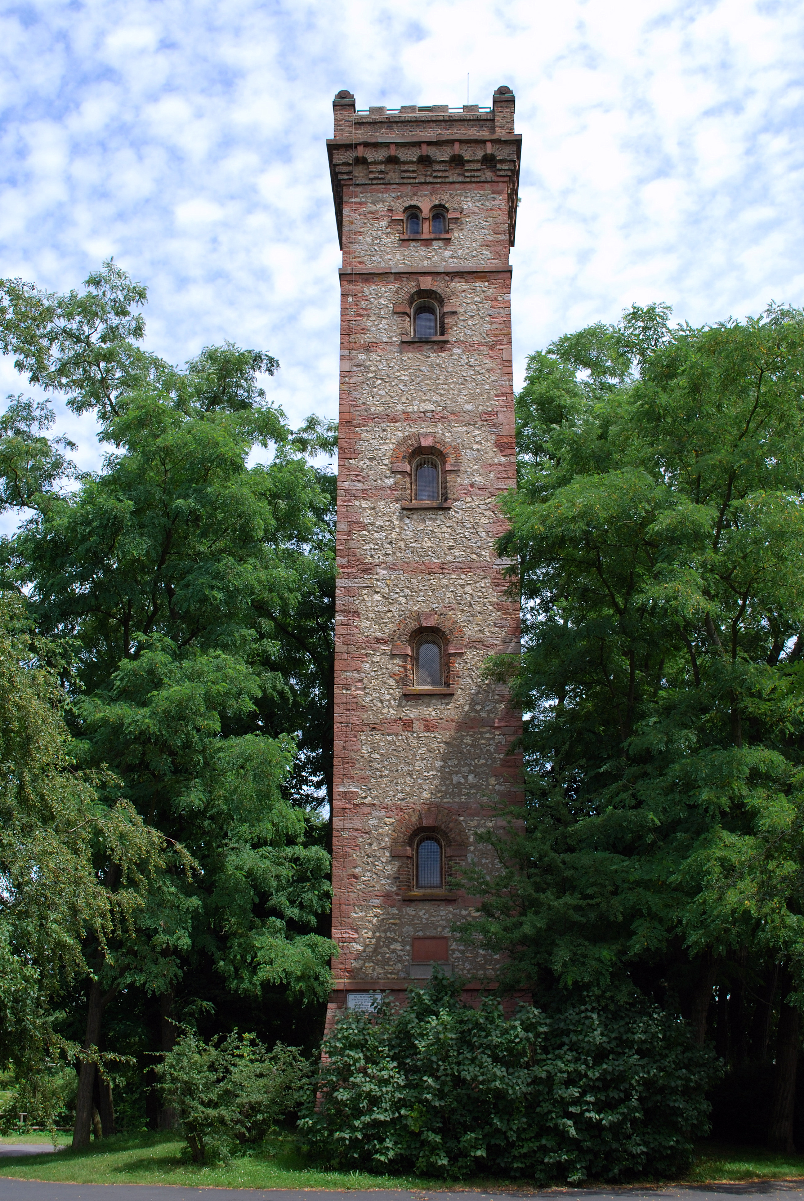 Der 24 Meter hohe Bieberer Aussichtsturm in Offenbach-Bieber. Er wurde 1882 erbaut und ist von Anfang Mai bis Ende Oktober an Sonn- und Feiertagen geöffnet.